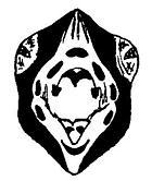 Rachenzeichnung Ringelastrid